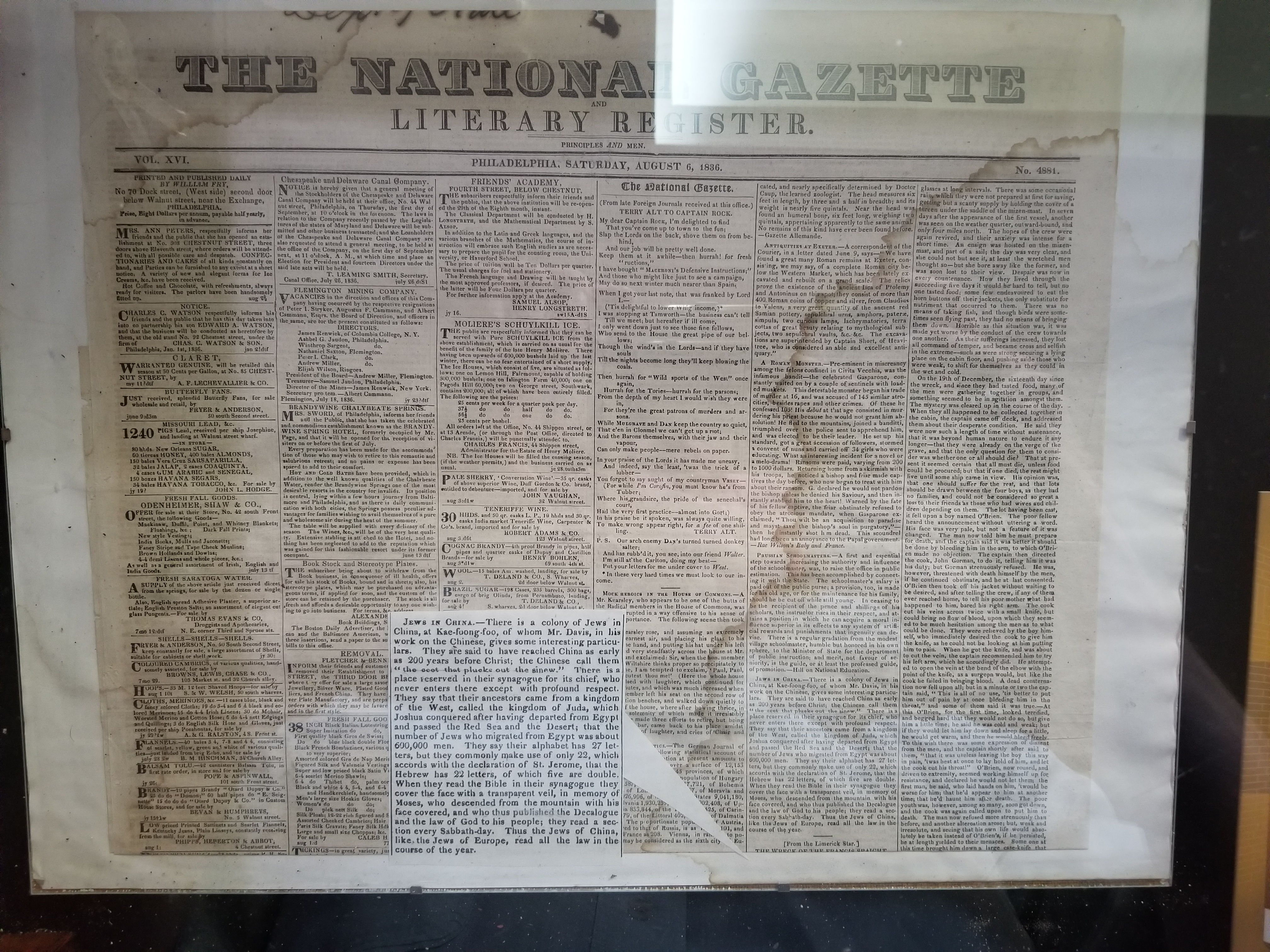 כתבה בעיתון אמריקאי מהמאה ה-19 על קהילה יהודית בסין